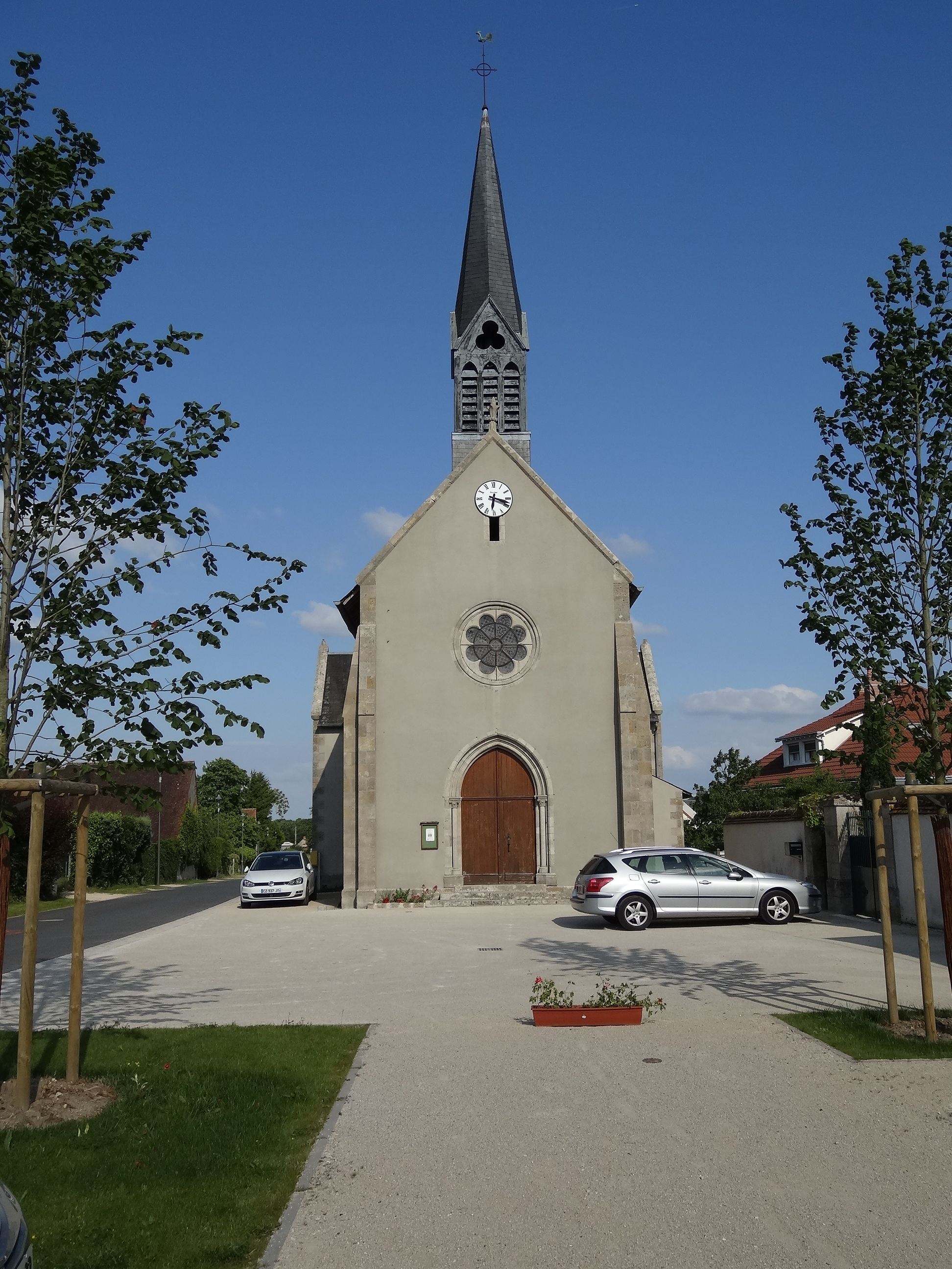 Église vue de la mairie